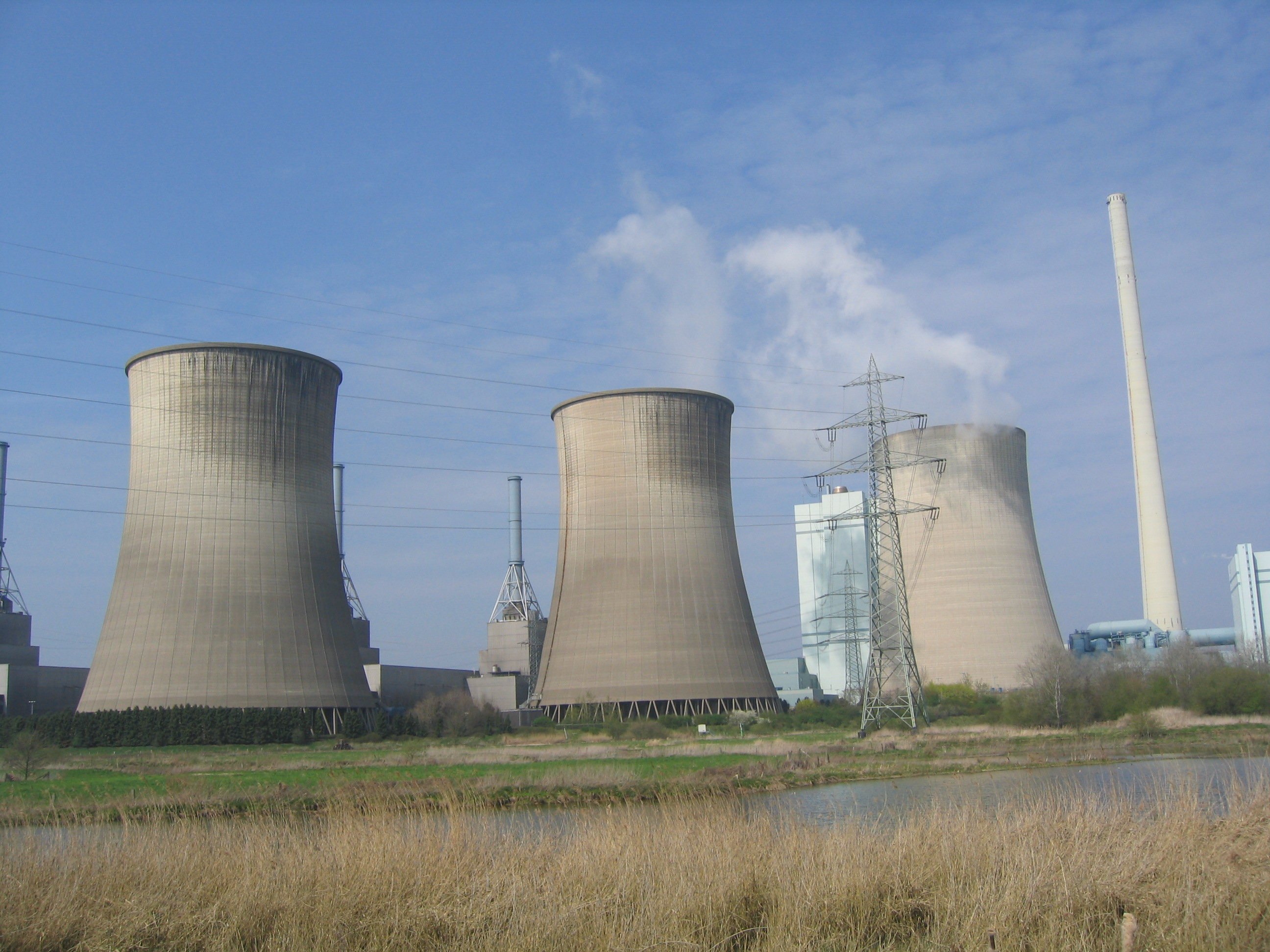 Gersteinwerk, Werne Stockum, Lippe im Vordergrund